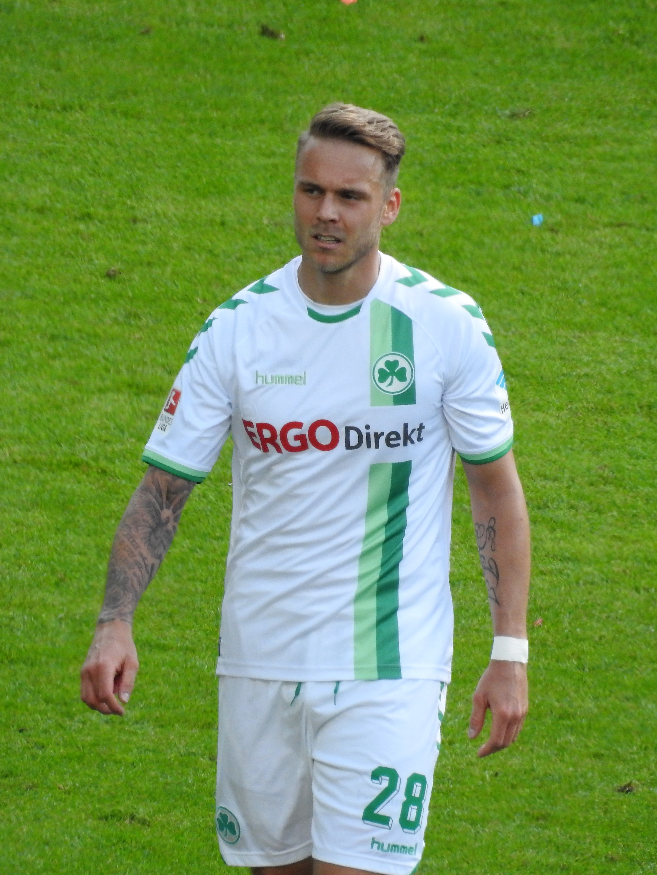 Marcel Franke SpVgg Fürth